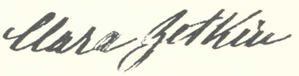 Unterschrift von Clara Zetkin